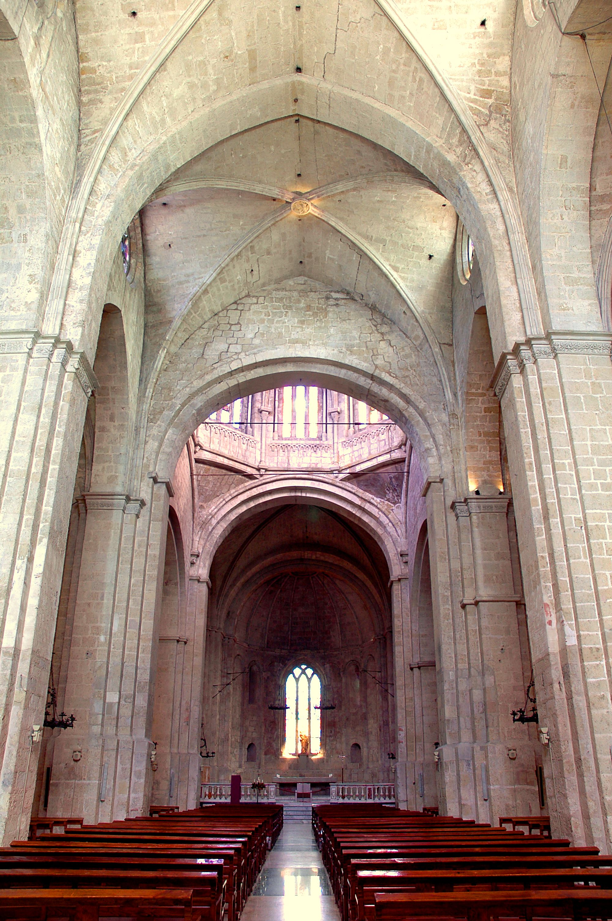 Monestir de Sant Cugat - Interior